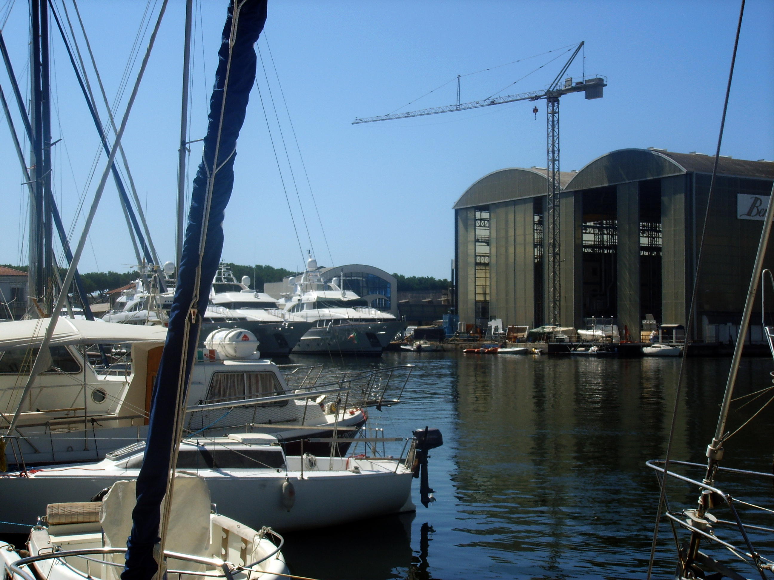 Viareggio, arsenals in Viareggio, italy